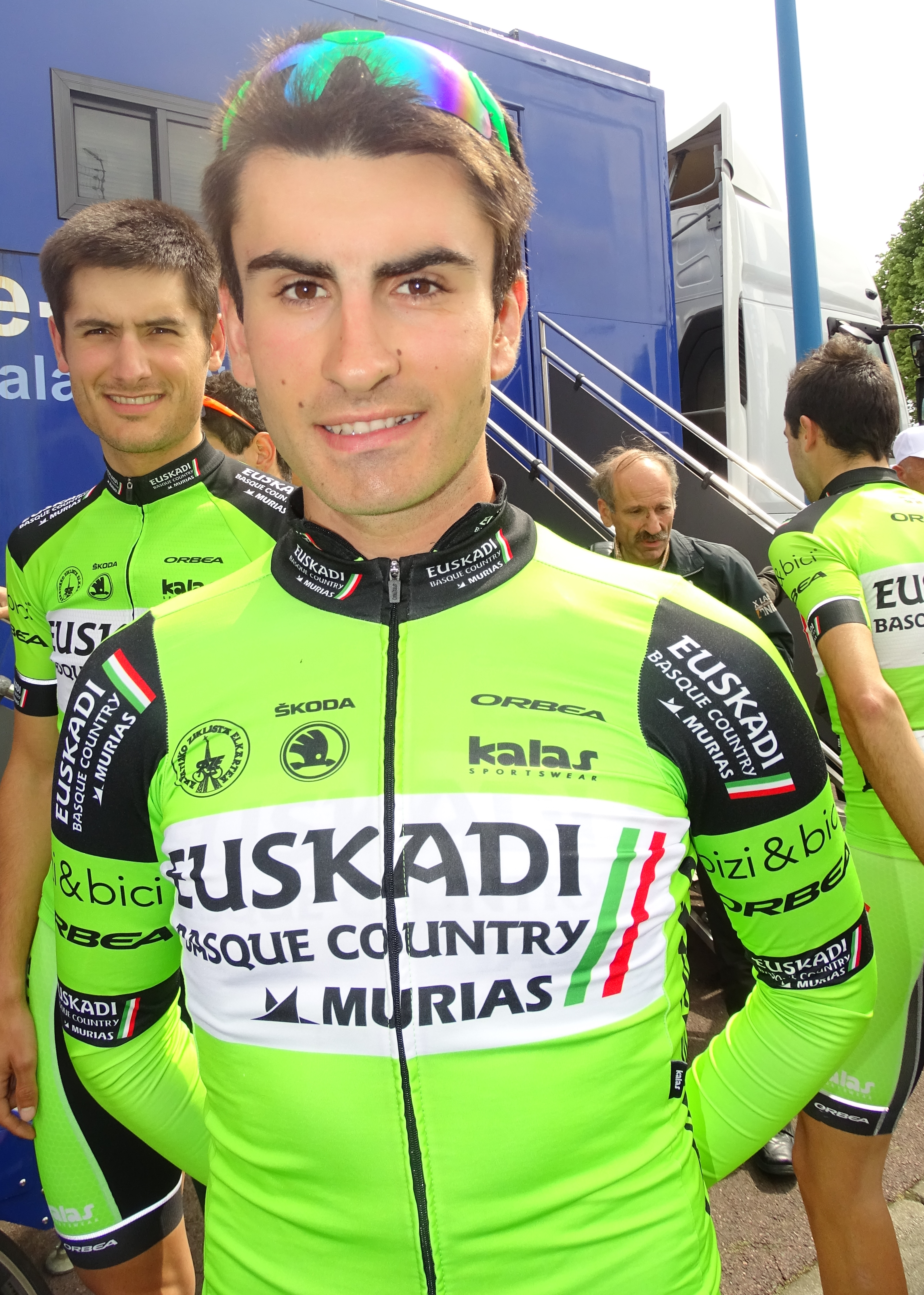 Reportage réalisé le vendredi 20 mai 2016 à l'occasion du départ de la première étape du Paris-Arras Tour 2016 à Douchy-les-Mines, Nord, Nord-Pas-de-Calais-Picardie, France.